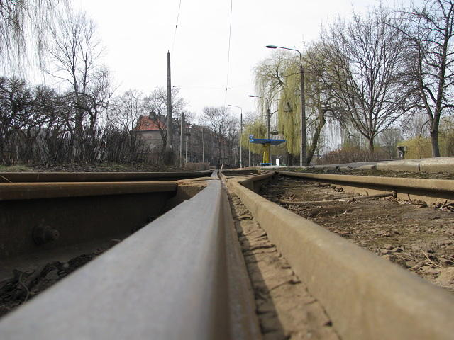 Tory Bydgoszcz